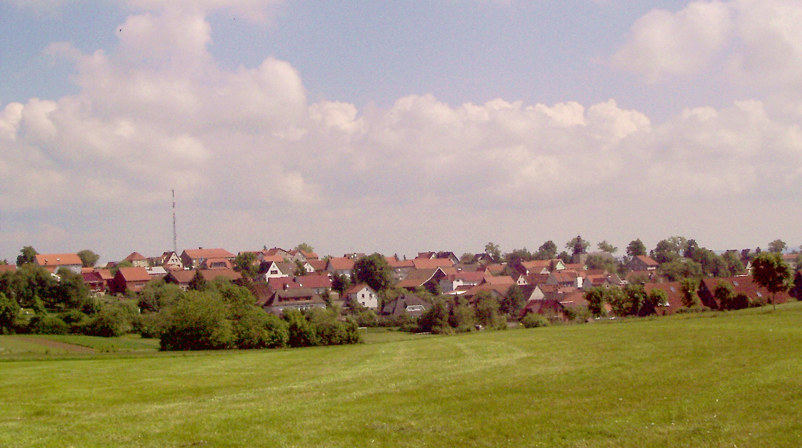 Das Dorf Eigenrieden in einer Talmulde auf dem Plateau des nördlichen Hainich. Vom Mühlhäuser Landgraben aus gesehen.